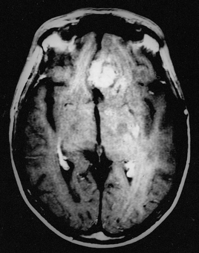 CNS: RECURRENT GLIOBLASTOMA MULTIFORME Recurrent glioblastomas produce expansile foci of contrast enhancement. These imaging features are nonspecific, however, and may be due to radionecrosis rather than recurrent tumor.